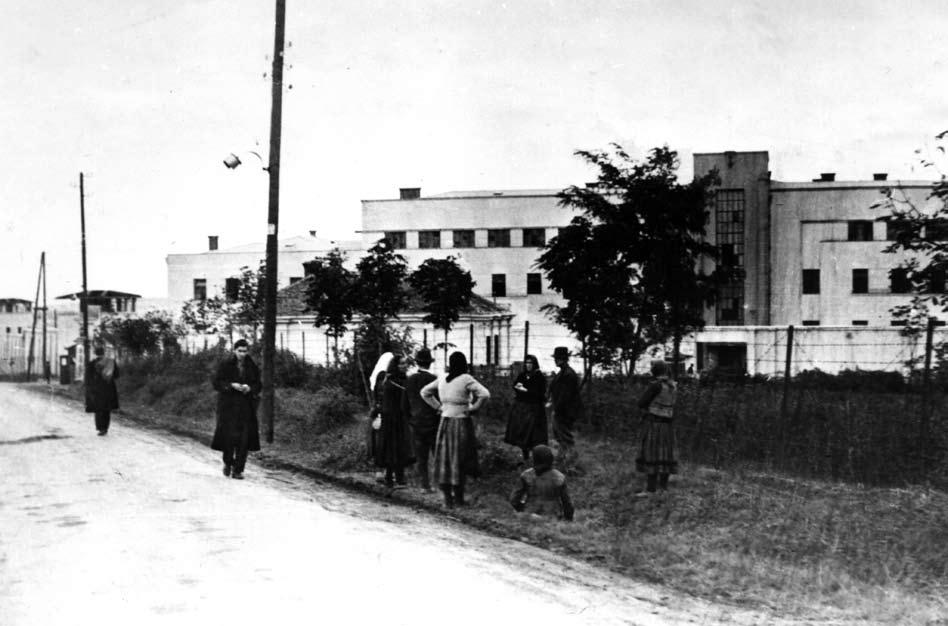 Srpskohrvatski / српскохрватски: Rodbina zatočenih logoraša ispred Banjičkog logora. Fotografiju je krišom načinio poznati foto-reporter Rista Marjanović (1885-1969). Fotografiju je objavio u Jugoslaviji pre 1969.